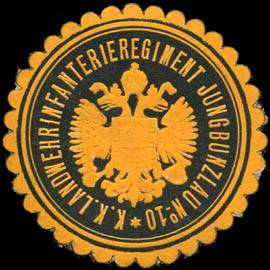 Sealing stamp Title: K. K. Landwehrinfanterieregiment Jungbunzlau No. 10 Description: gelb, schwarz, geprägt Place: size: 4 cm